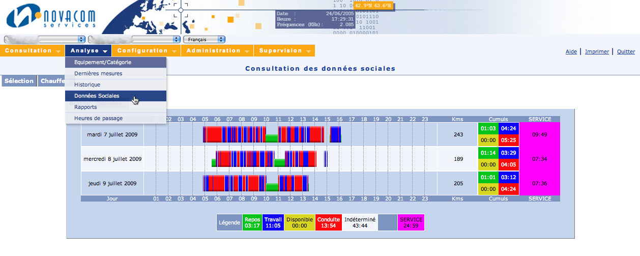 Visualisation dedonnées sociales récupérées via un boitier télématique.